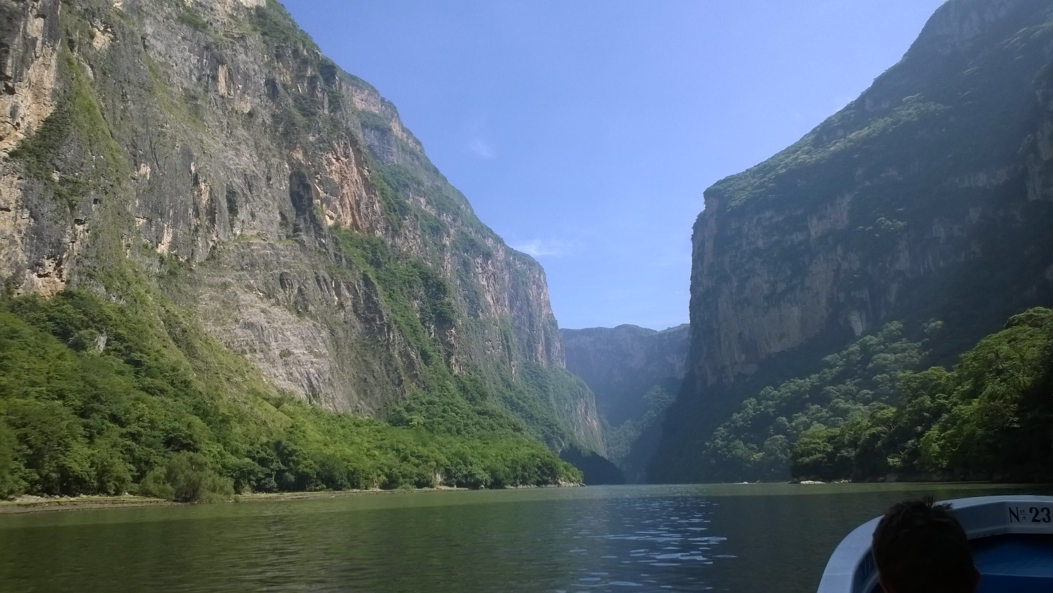 Cañón del Sumidero